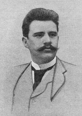 Axel Danielsson (1863-1899)